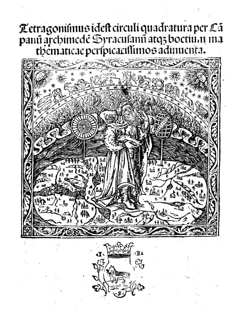 Tetragonismus idest circuli quadratura per Campanum archimedem Syracusanum atque boetium mathematicae perspicacissimos adinuenta. - Impressum Venetiis : per Ioan. Bapti. Sessa, 1503. - 32 c. : ill ; 4º. - Epistola e additiones di Luca Gaurico. - Stampato da Giacomo Penzio (Cfr.: Short-title Catalogue of Books printed in Italy, p. 292) .